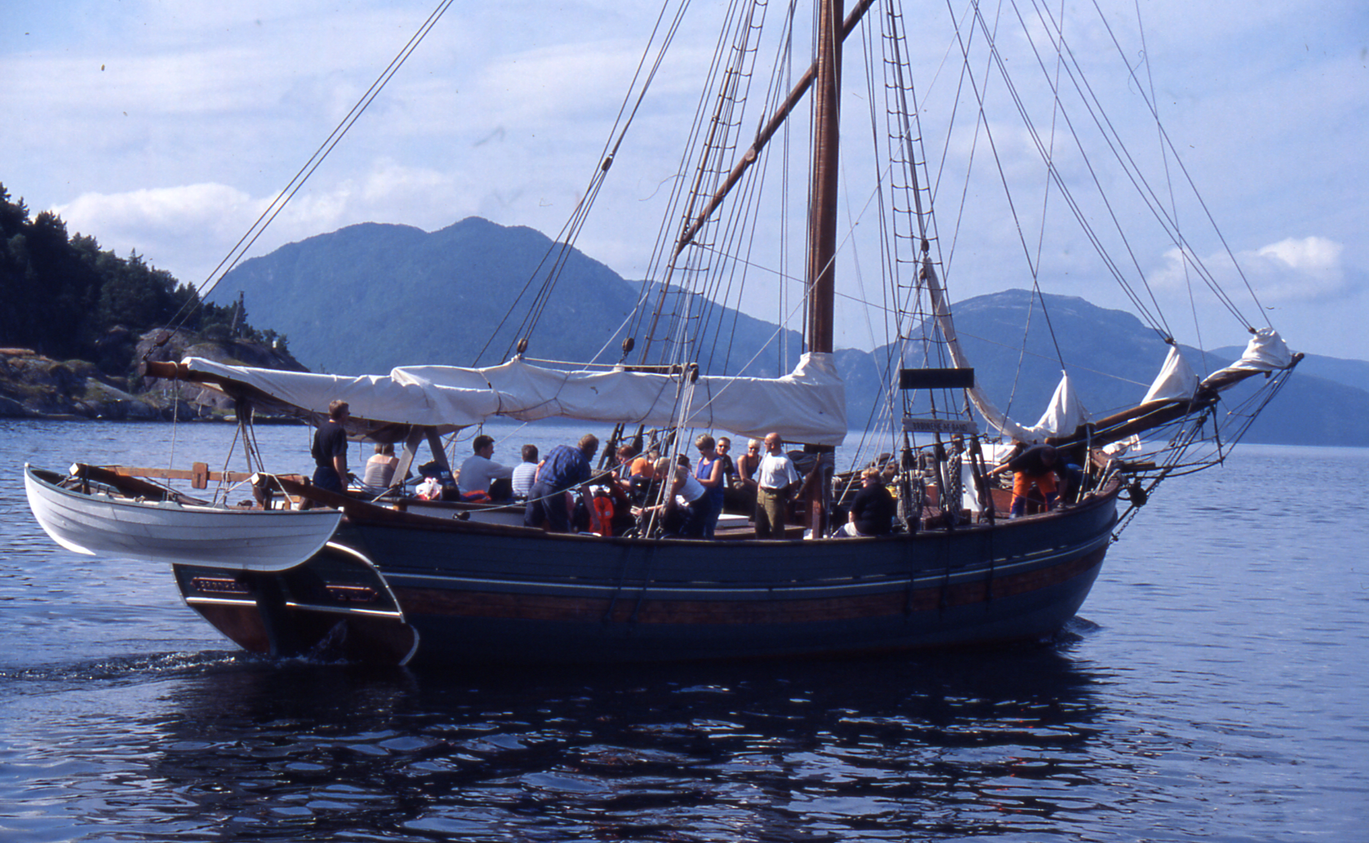 Jakta "Brødrene af Sand" tilhøyrer Ryfylkemuseet.